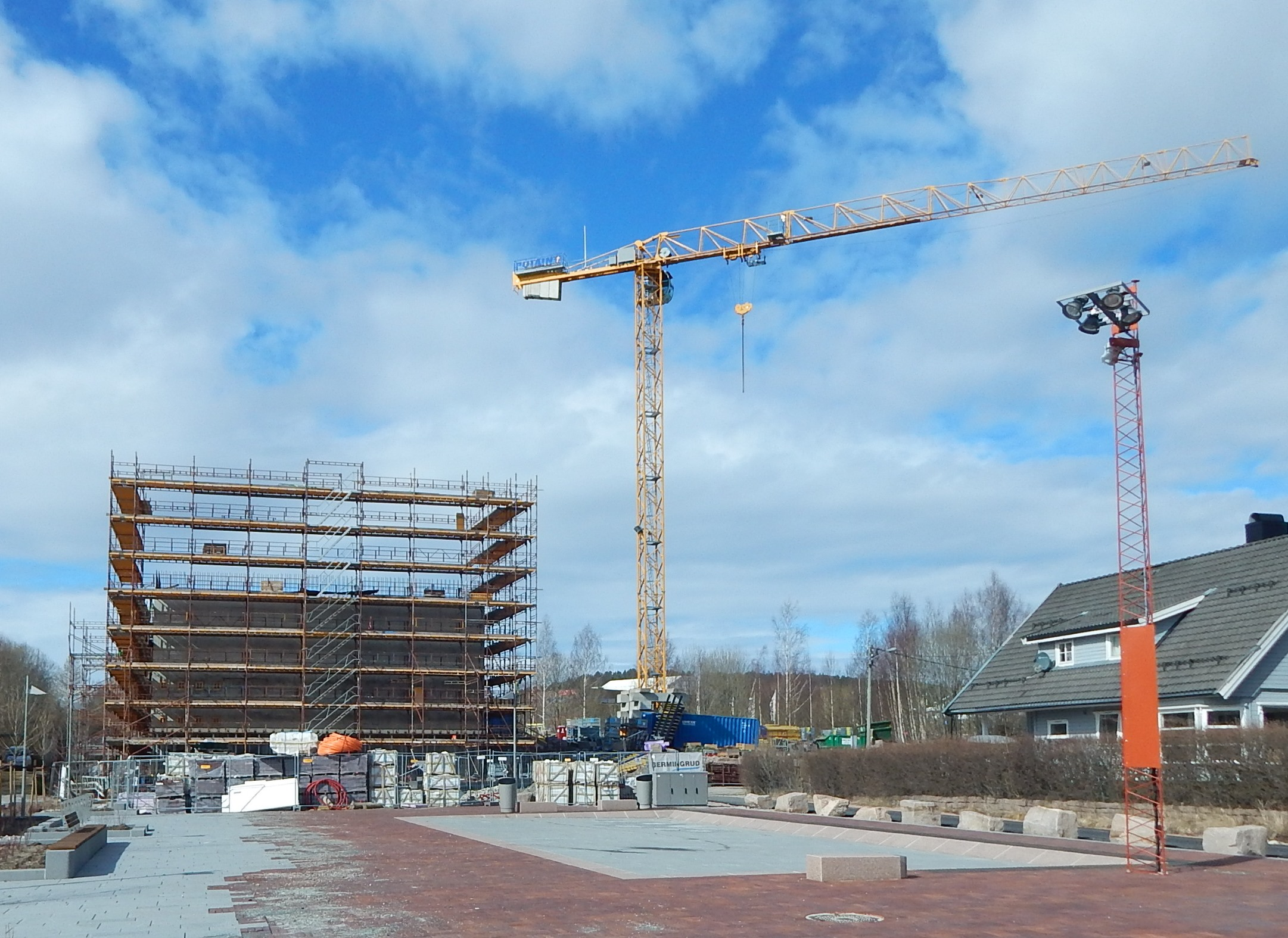 Spikkestad kirke- og kultursenter under bygging, april 2017.